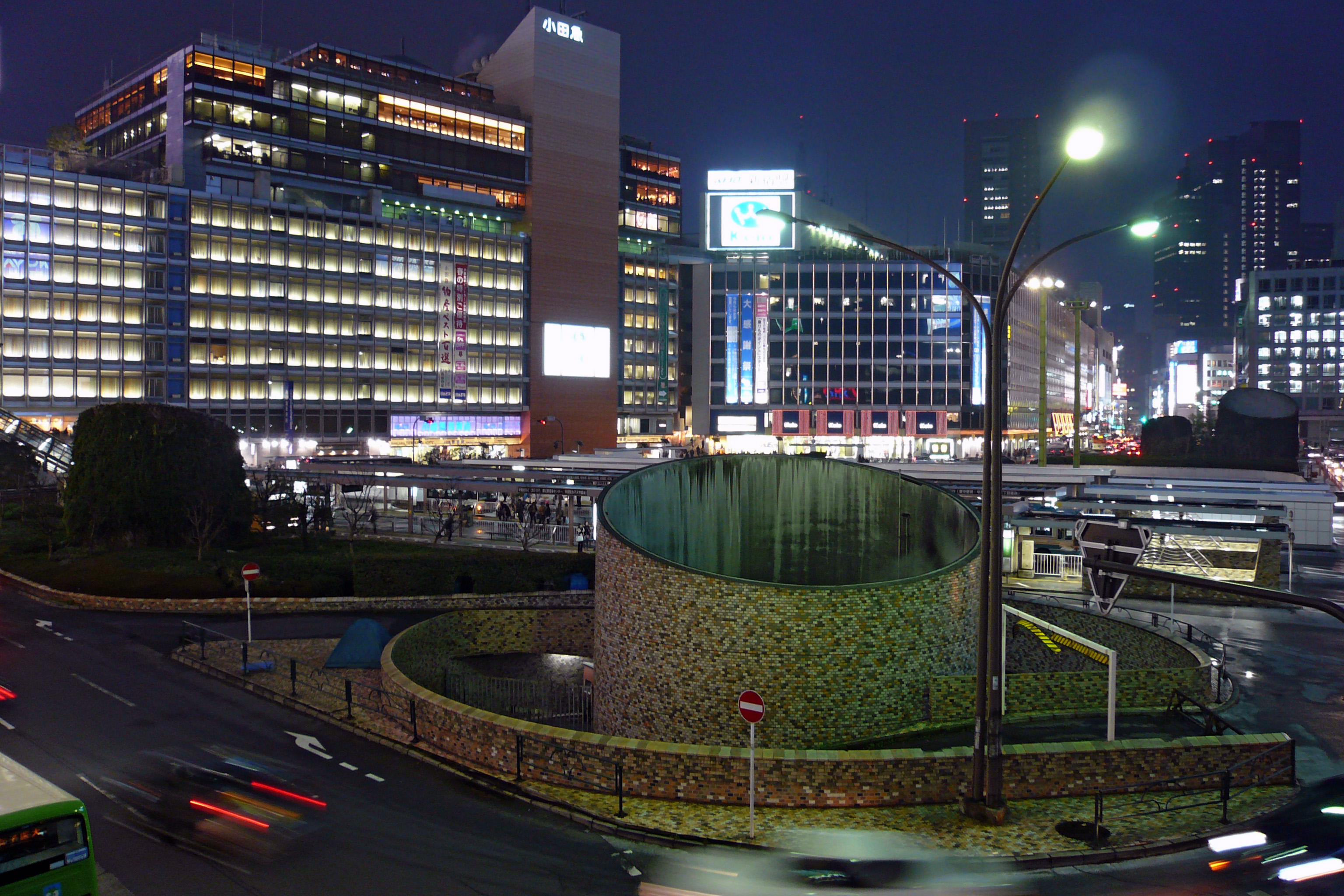 Shinjuku station in Shinjuku-ku, Tokyo, Japan